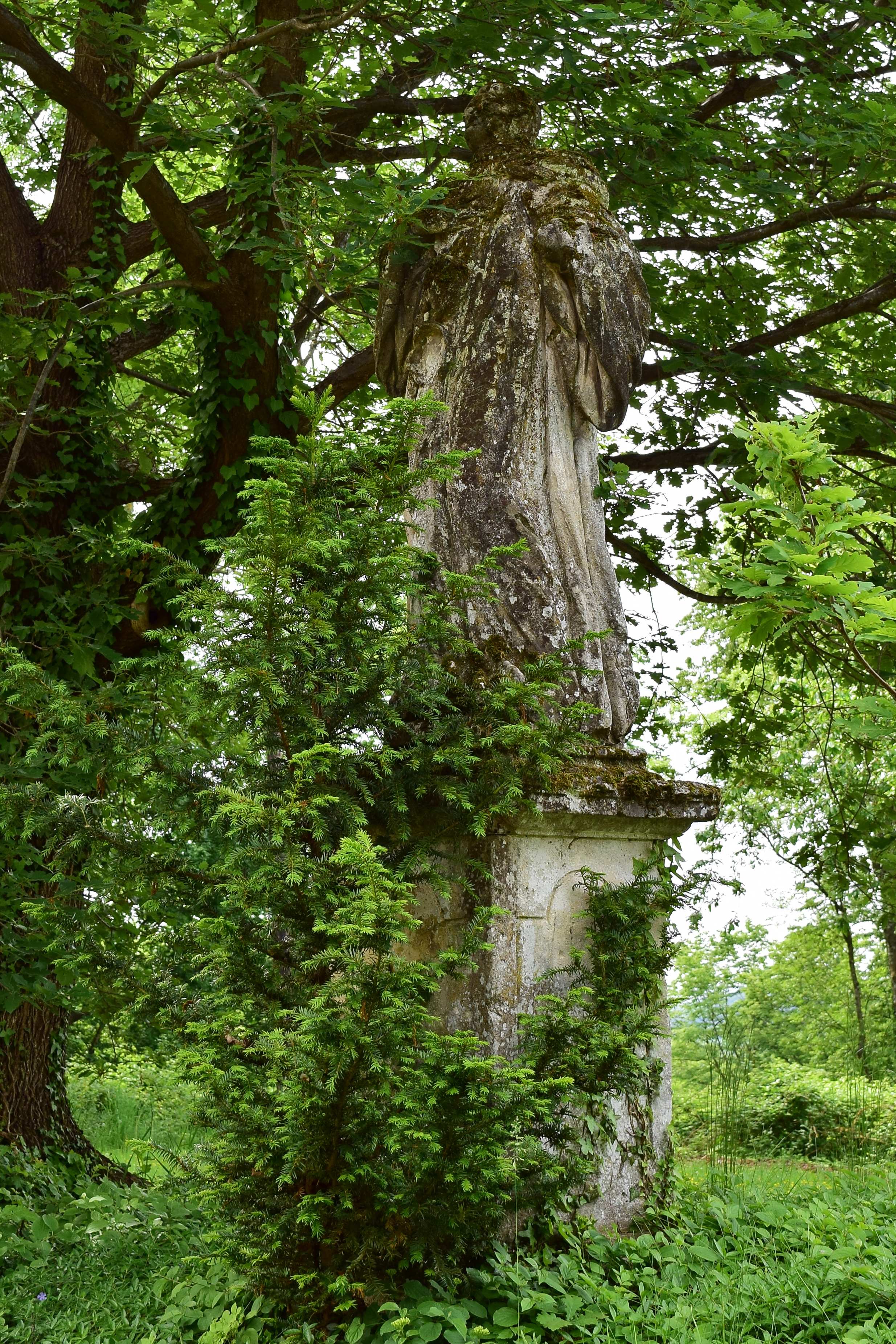 Figurenbildstock hl. Leonhard